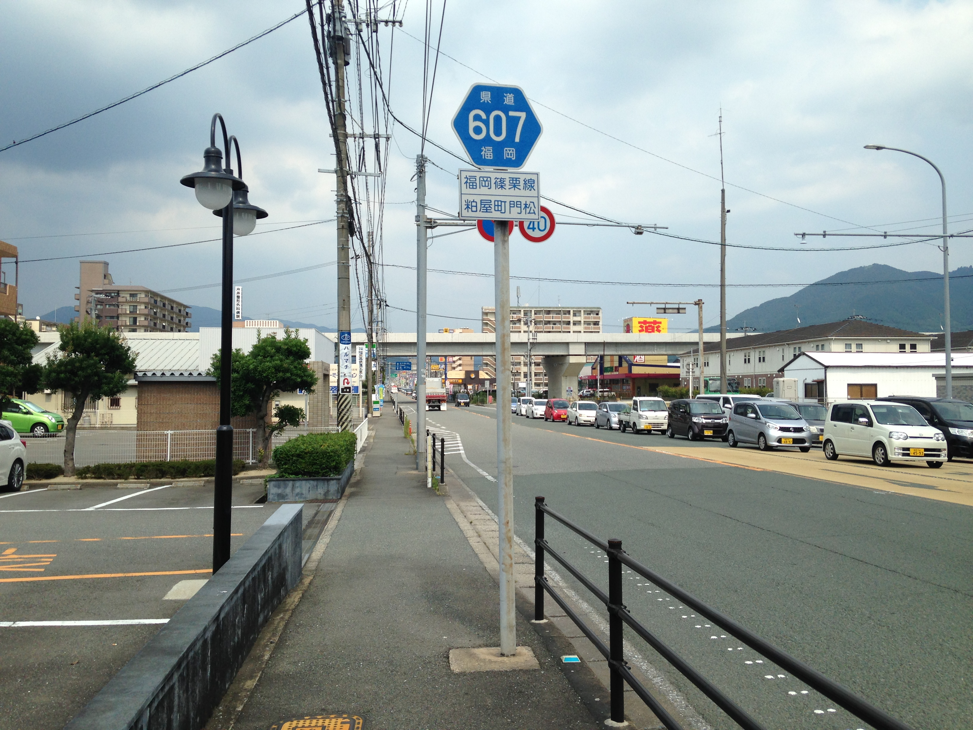 門松交差点東側の福岡県道607号